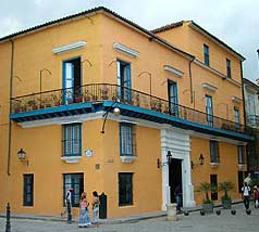 Façana del Palau del Compte de Lombillo